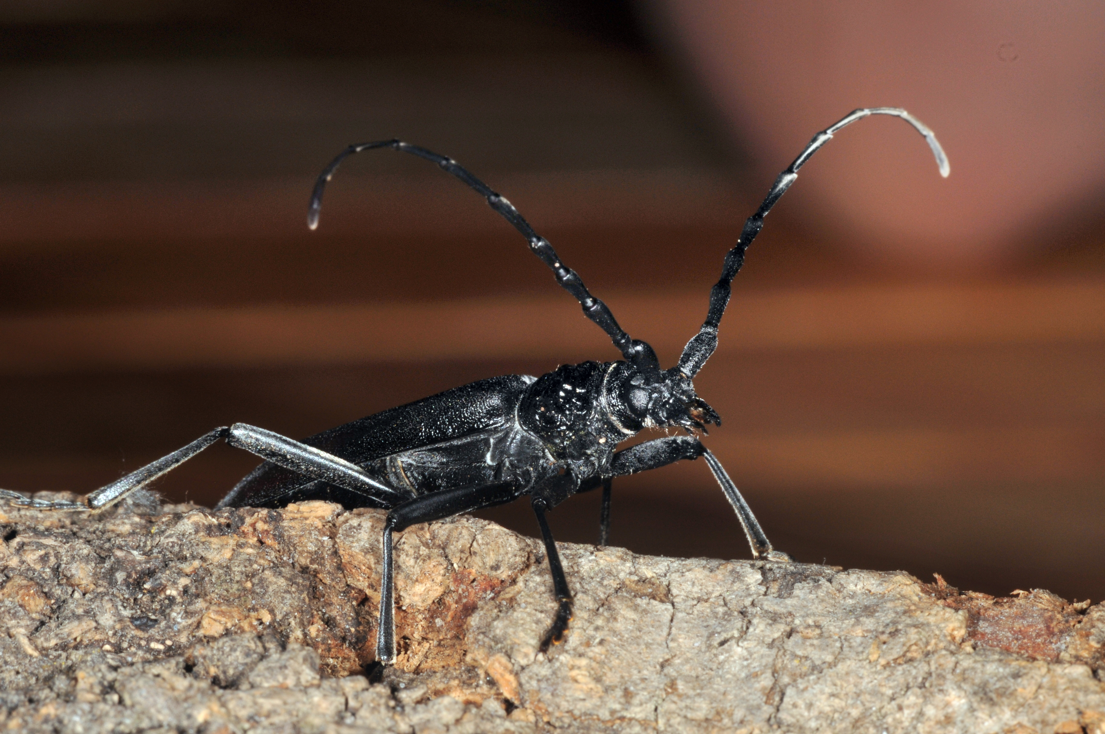 Cerambyx cerdo, Schwanheimer Wiese, Spielplatz, Frankfurt am Main, Hessen, Deutschland